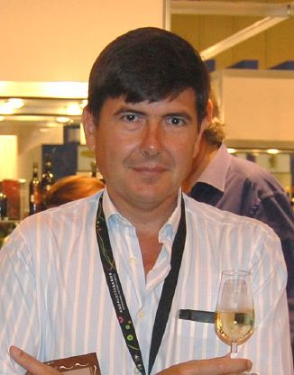 Manuel Pimentel en el stand de la denominación de origen Montilla Moriles en Andalucía Sabor 07.